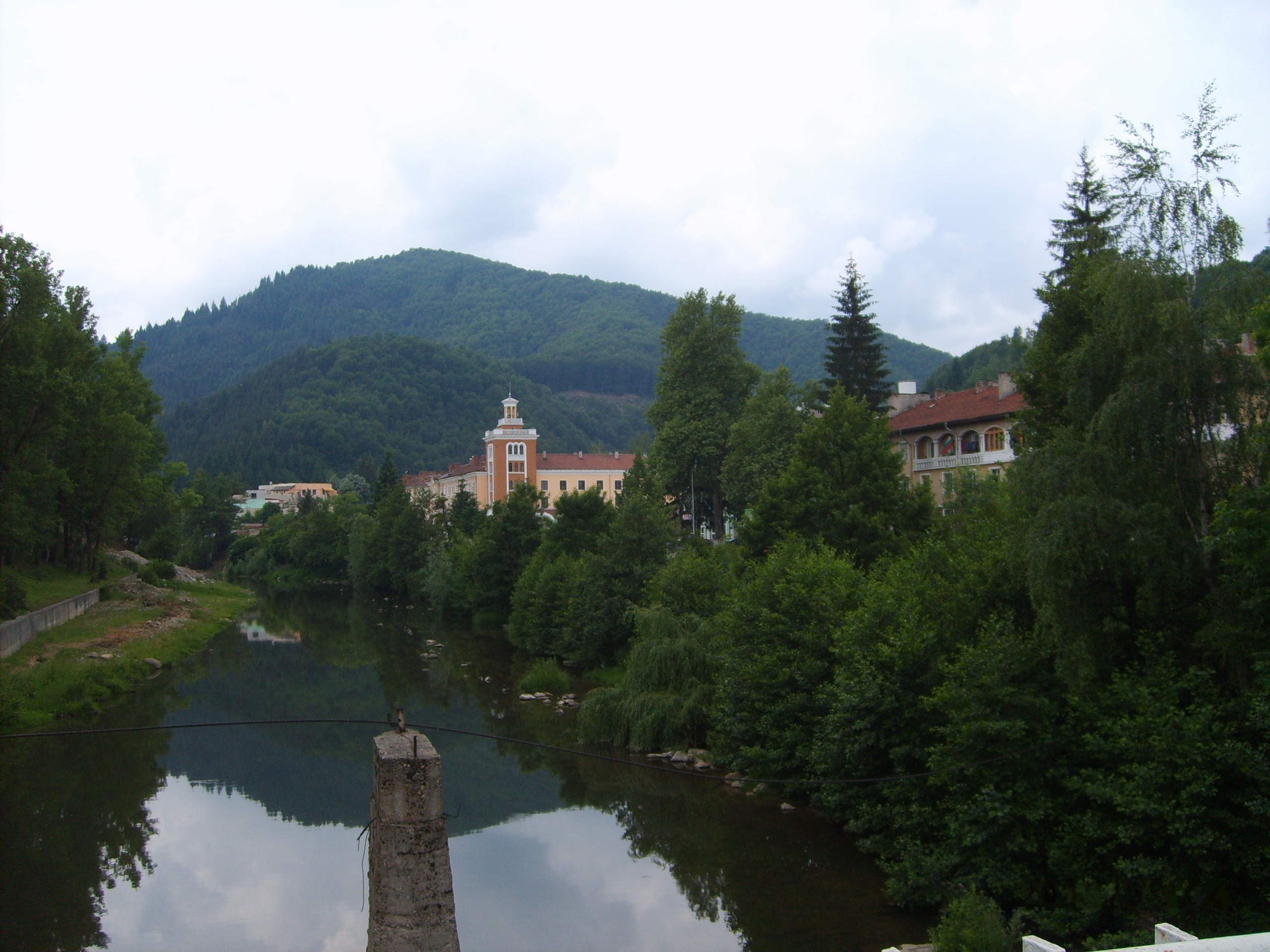 Чепинската река, минавайки през центъра на града в Рудозем (в центъра се вижда рудоуправлението).